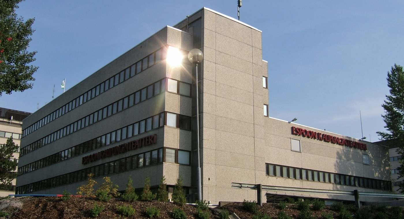 Espoon kaupunginteatterin Revontulihalli Revontulentiellä Tapiolassa.